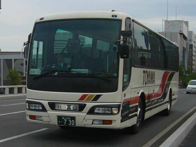 登録番号 富山230か・730 富山地方鉄道所属 富山 - 新潟線用 2007年5月12日 万代橋にて撮影